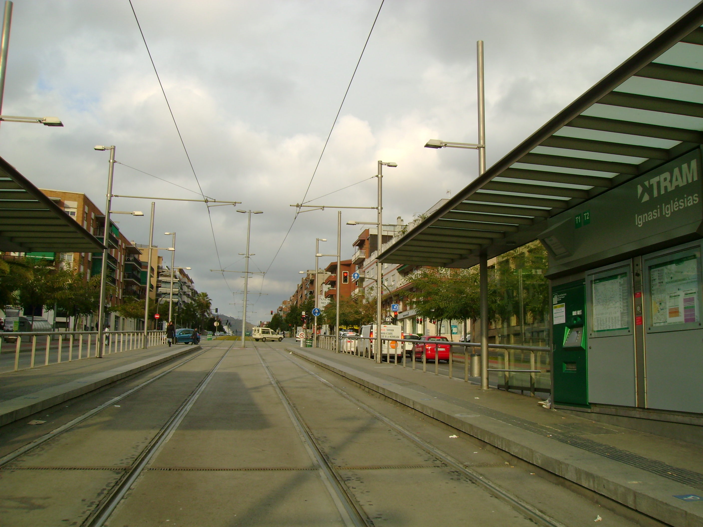 Foto capturada per la meva càmara a l'estació d'Ignasi Iglésias (Trambaix).